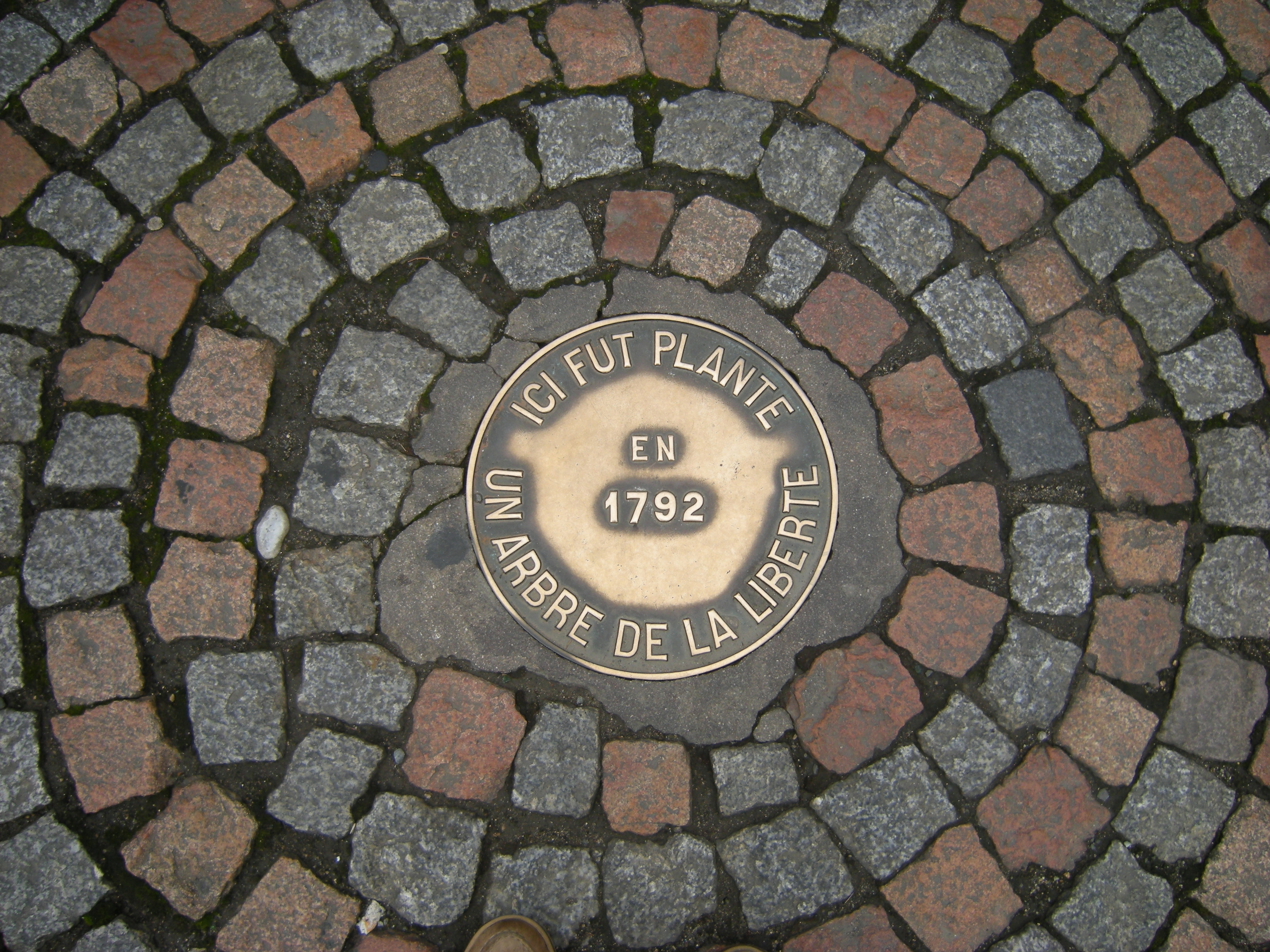 Plaque indiquant l'emplacement de l'Arbre de la liberté planté à Paimpol, place du Martray